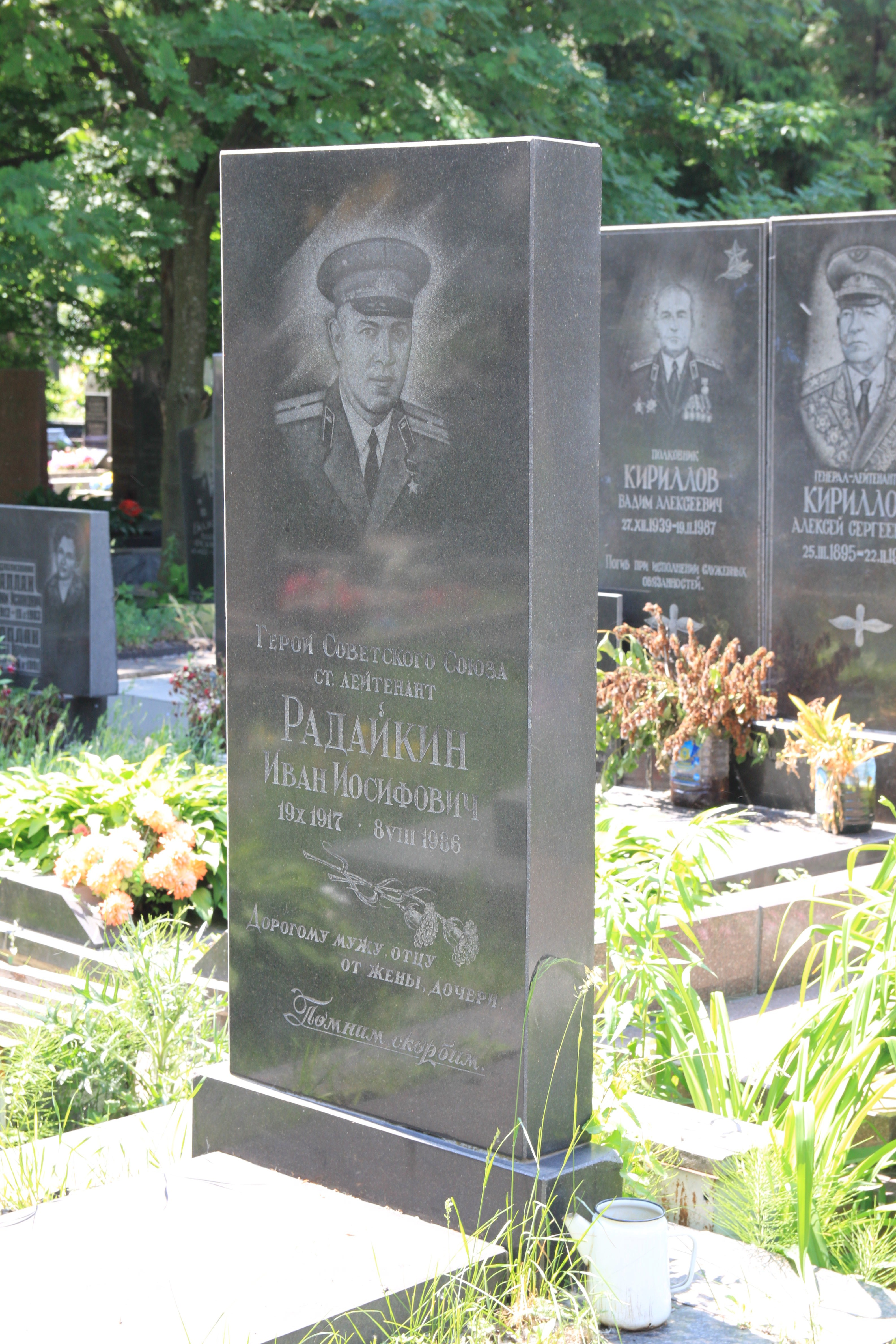 Могила Героя Советского Союза Ивана Радайкина на Лукьяновском военном кладбище Киева.